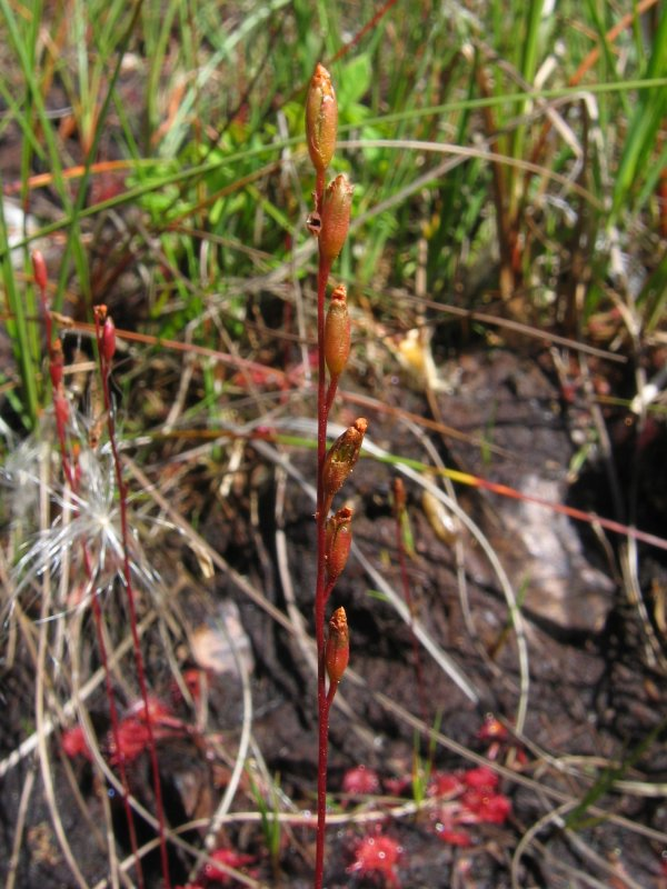 Rundblättriger Sonnentau (Drosera rotundifolia), Fruchtstand